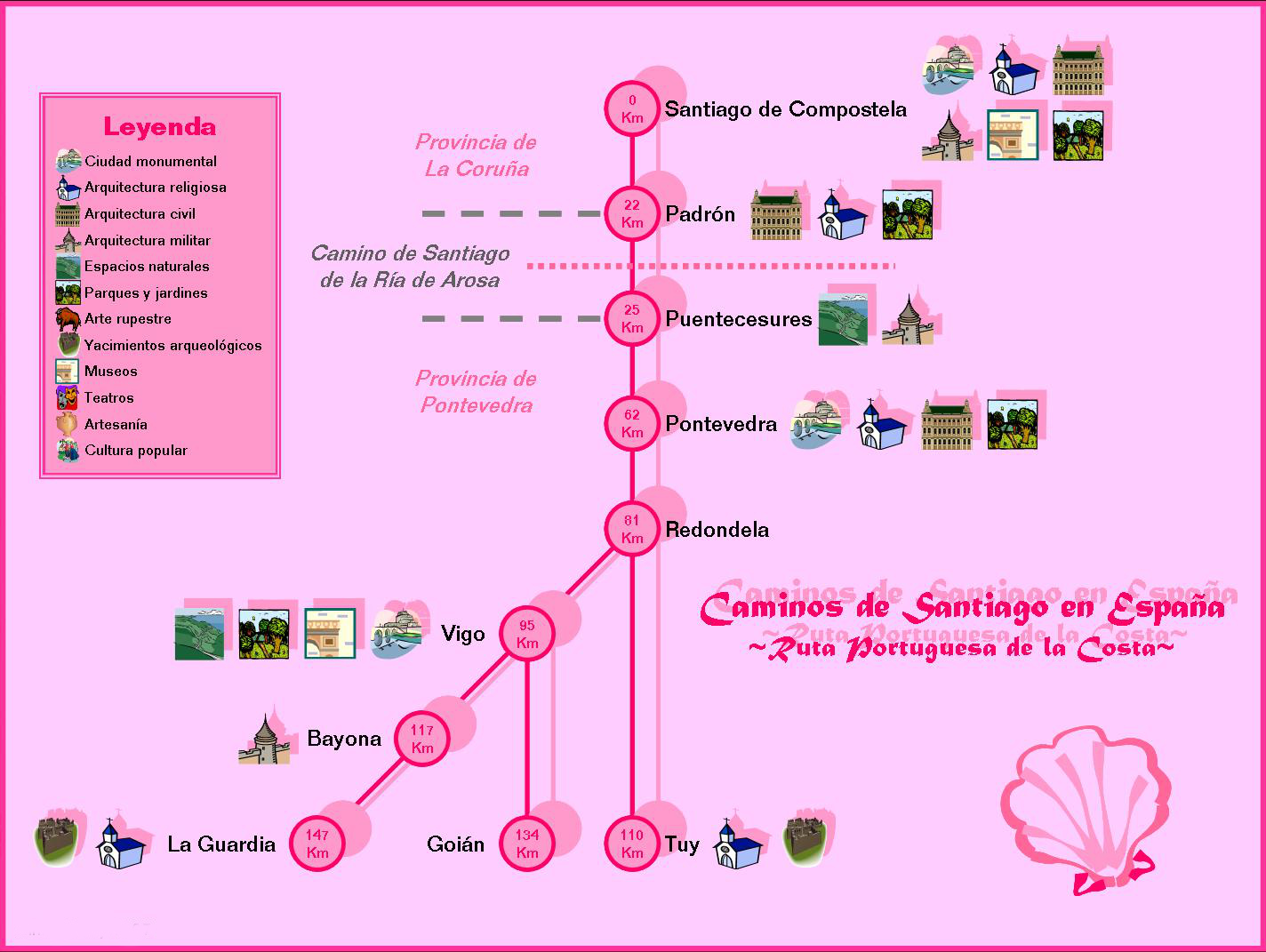 Caminos de Santiago en España: Ruta Portuguesa de la Costa